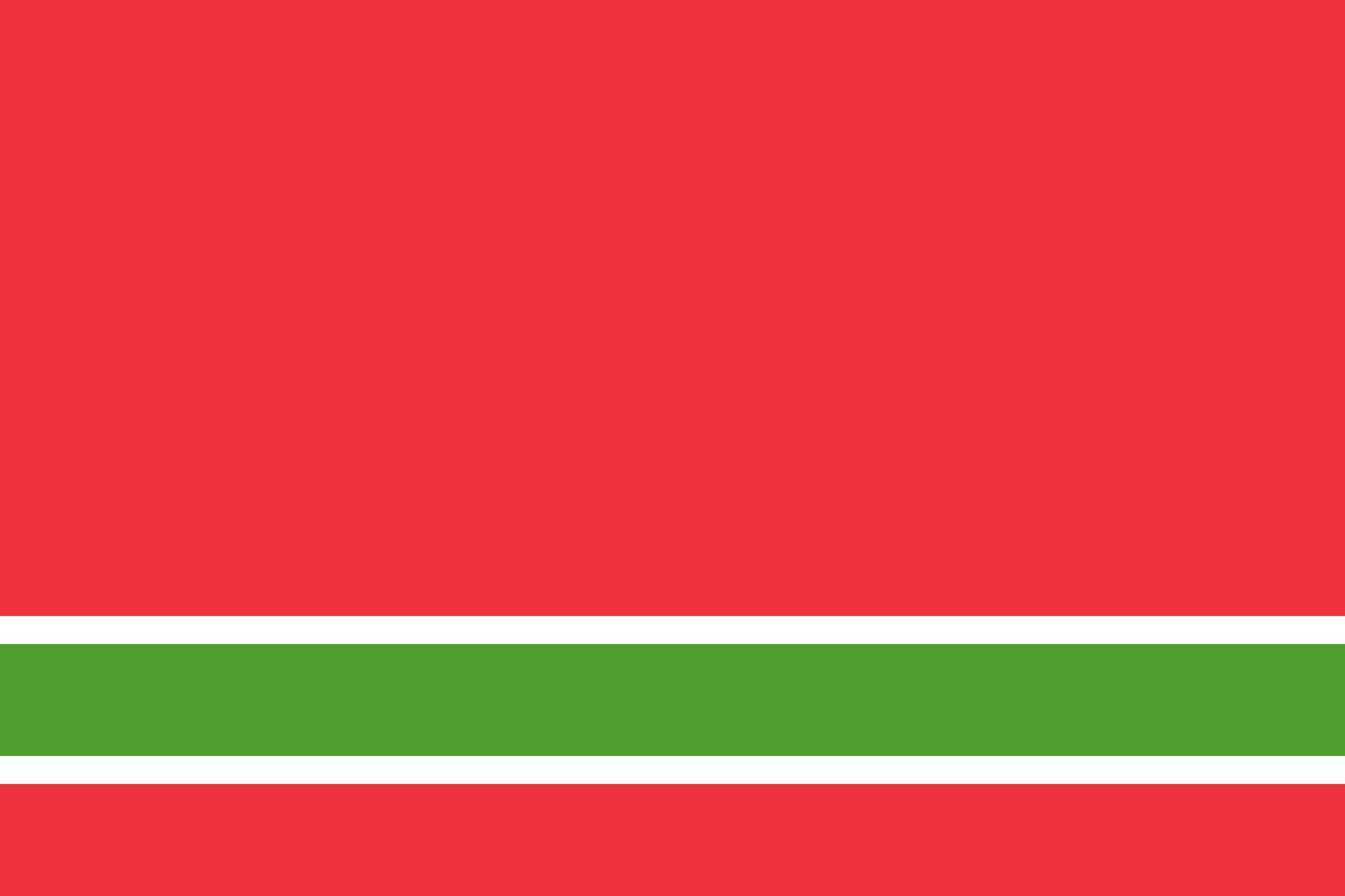 Флаг народов лезгинской ветви нахско-дагестанской семьи.